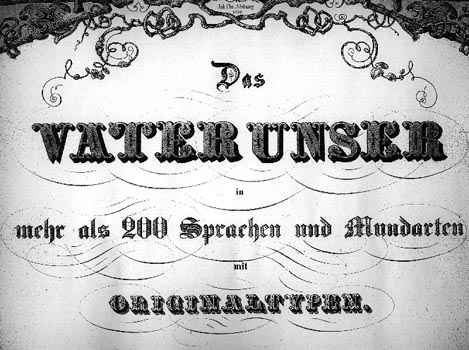 Image of "das Vaterunser" by Alois Auer Im zweiten Teil der Sprachenhalle ist das Vater-Unser "in 206 Sprachen und Mundarten, neuerdings gesammelt und aufgestellt von A. Auer von Welsbach mit 55 verschiedenen den Völkern eigenthümlichen Schriftzügen abgedruckt." So it goes–fonts, founts.